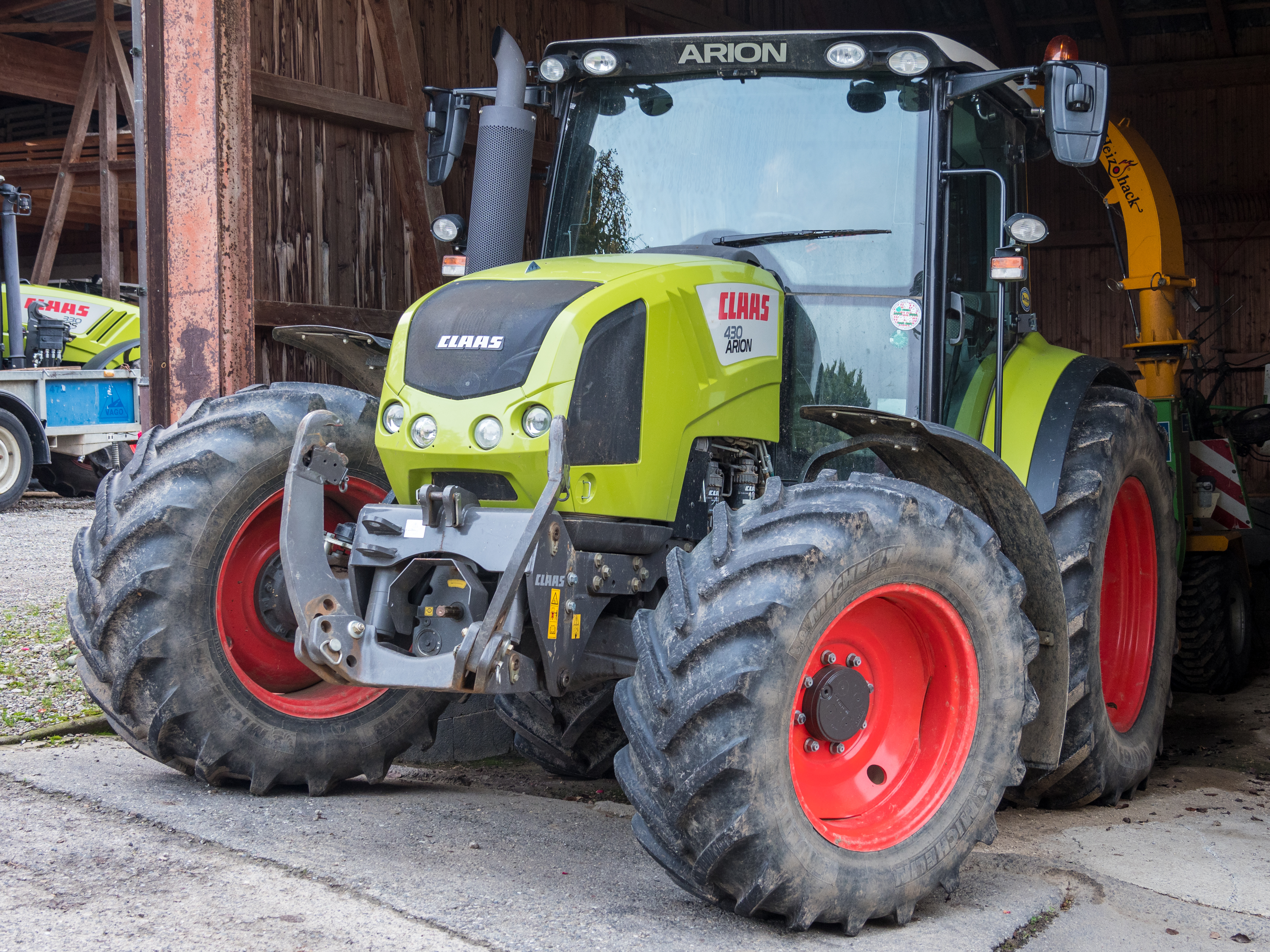 Claas Arion 430